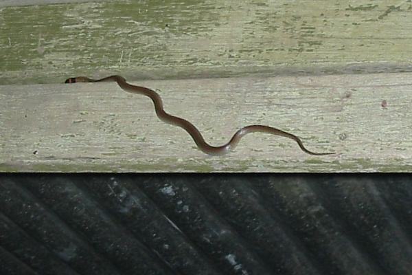 Red-naped Snake (Furina diadema)